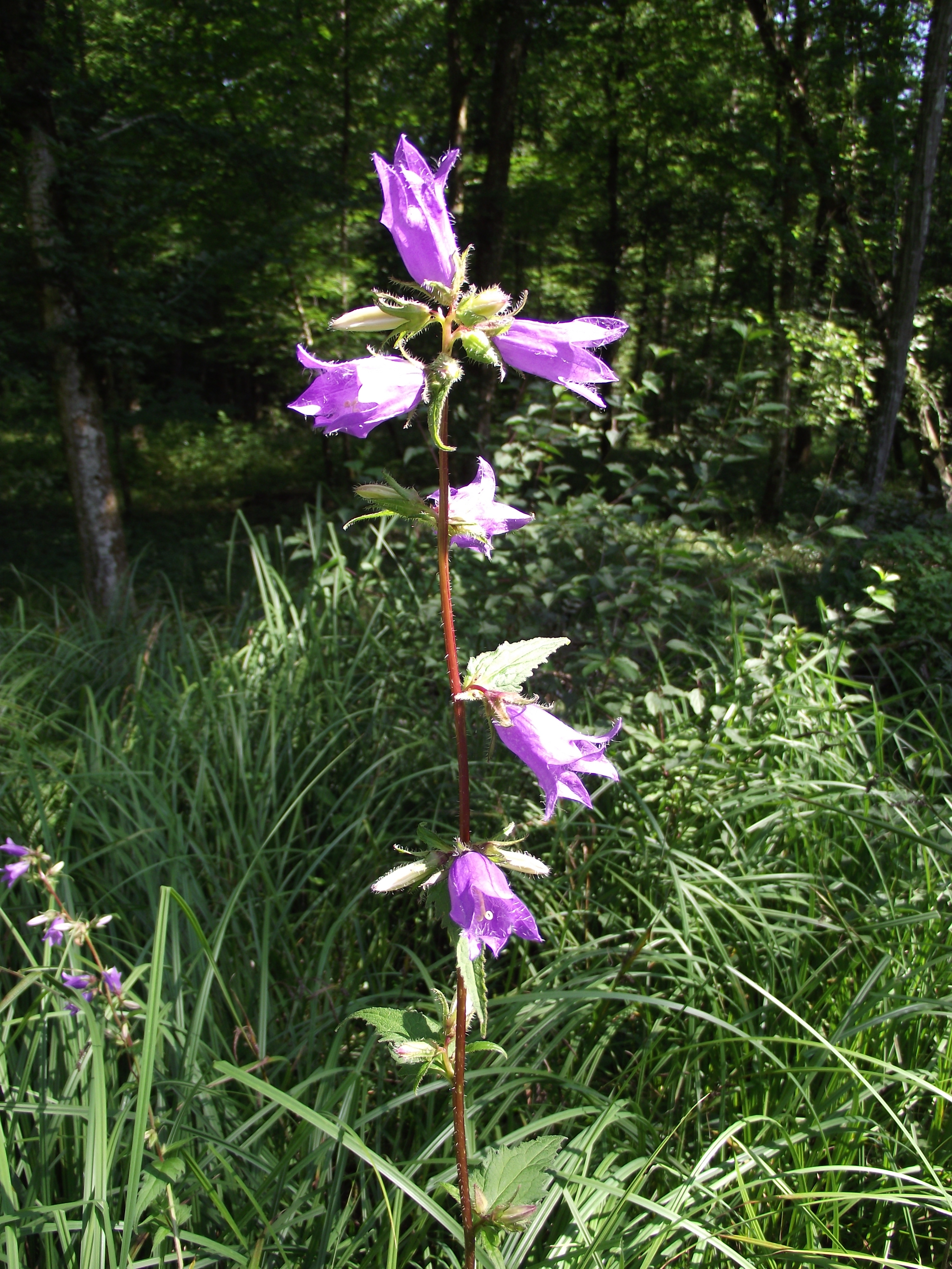 Campanula trachelium (forêt de Haguenau, Alsace, France)